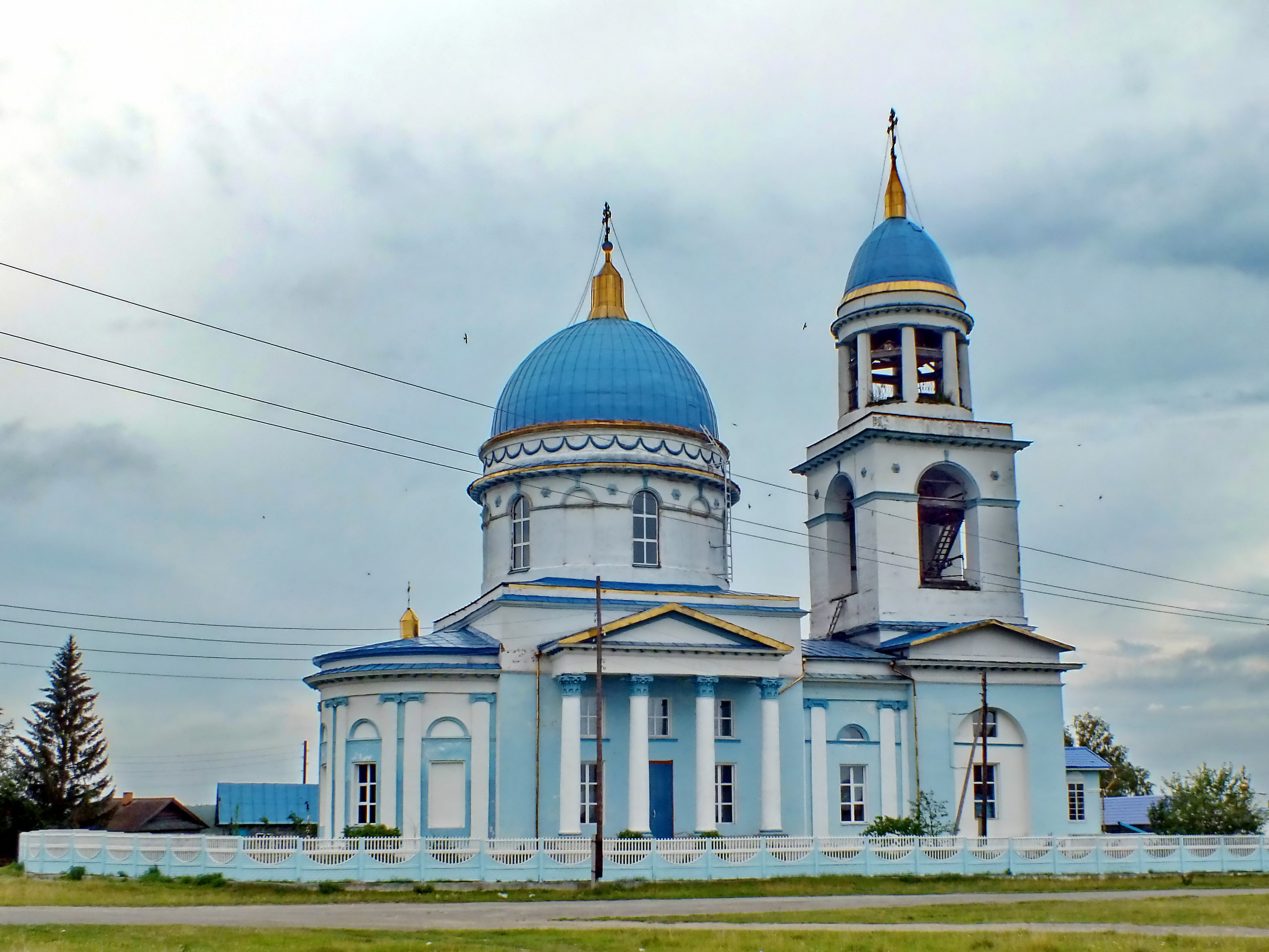 Церковь иконы Знамения Пресвятой Богородицы: ул. Ленина,2а, с. Воскресенское, Каслинский район, Челябинская область